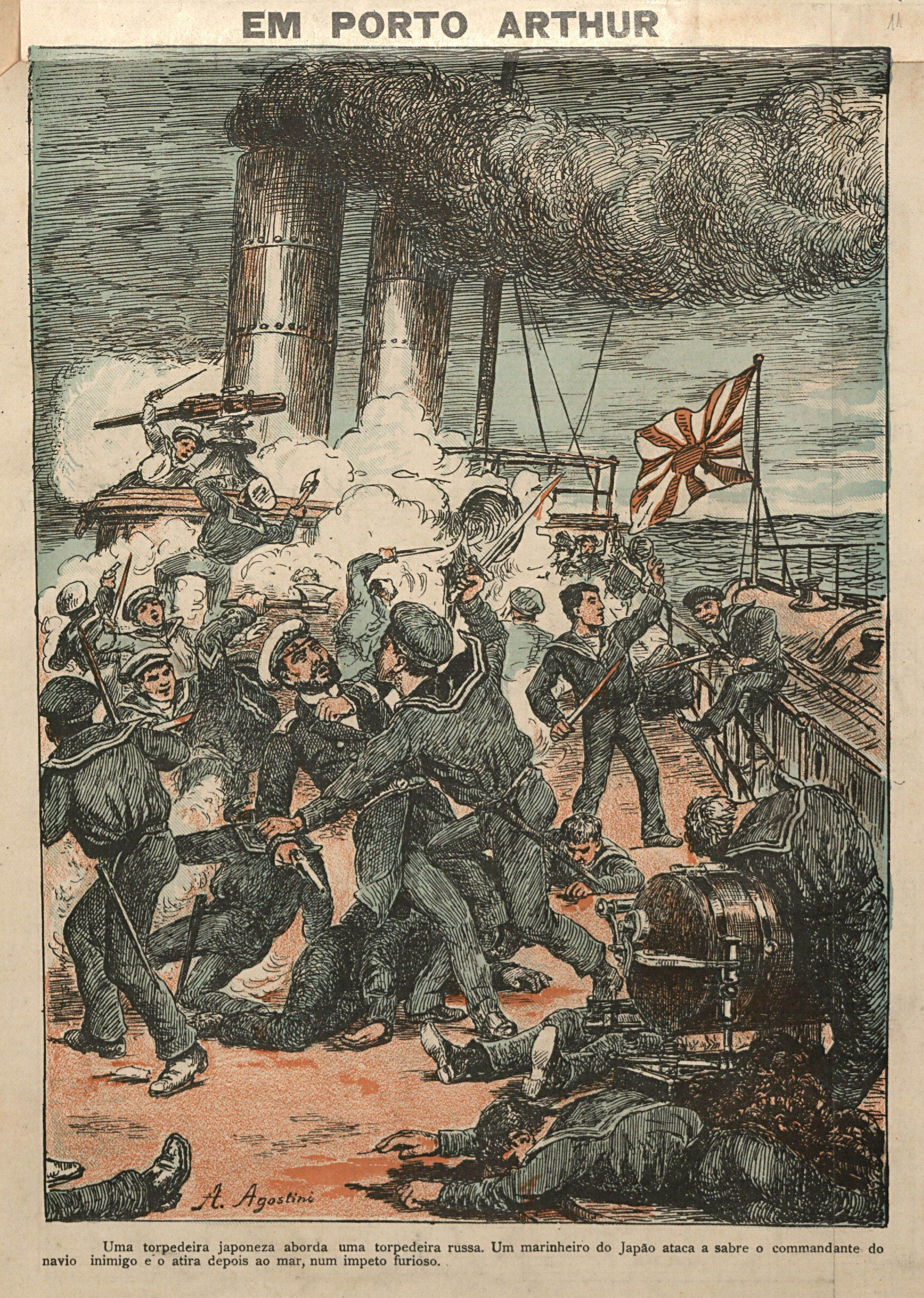 Uma torpedeira japonesa aborda uma torpedeira russa. Um marinheiro do Japão ataca a sabre o comandante do navio inimigo e o atira depois ao mar, num impeto furioso.